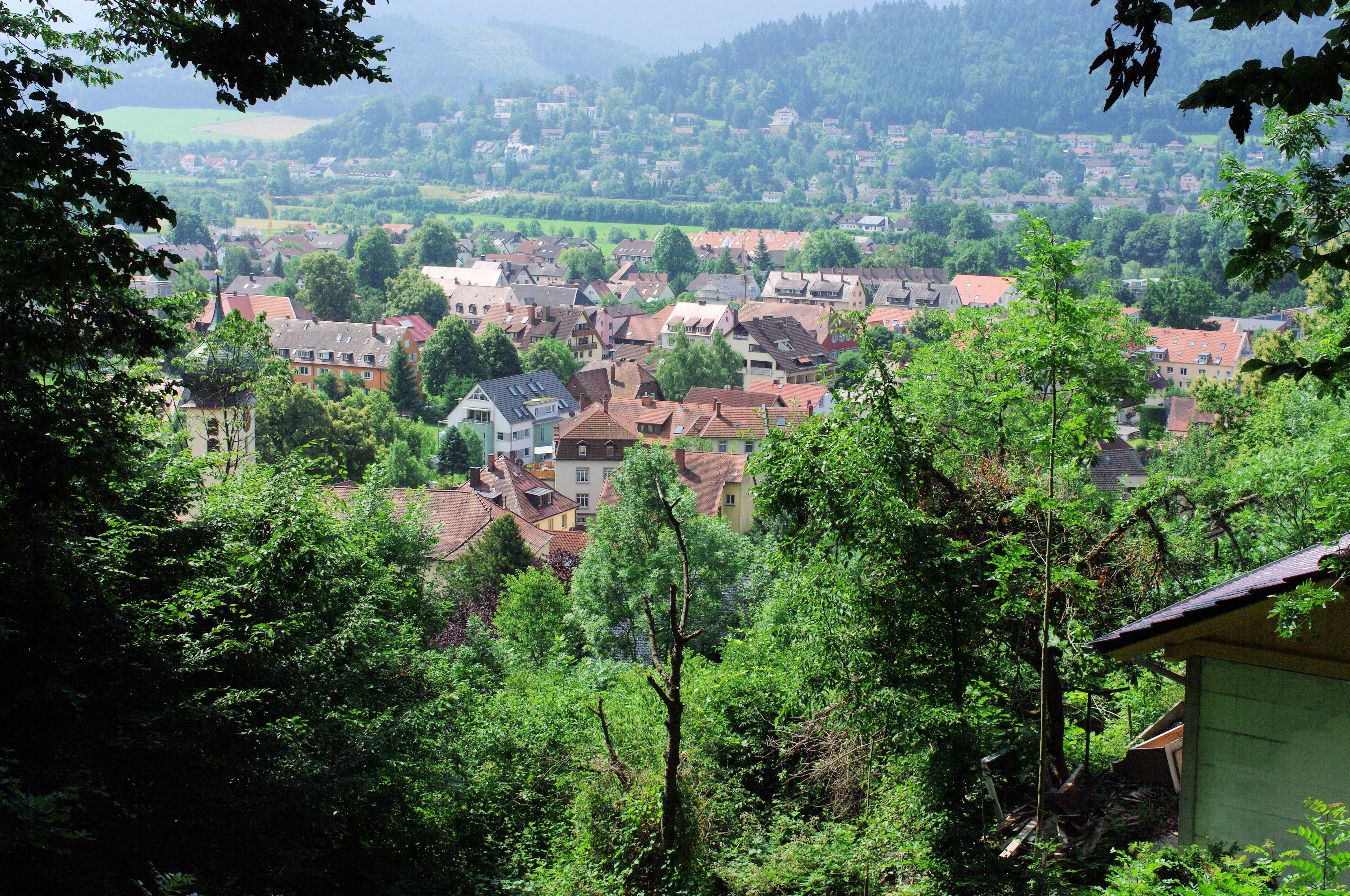 Blick auf Ebnet